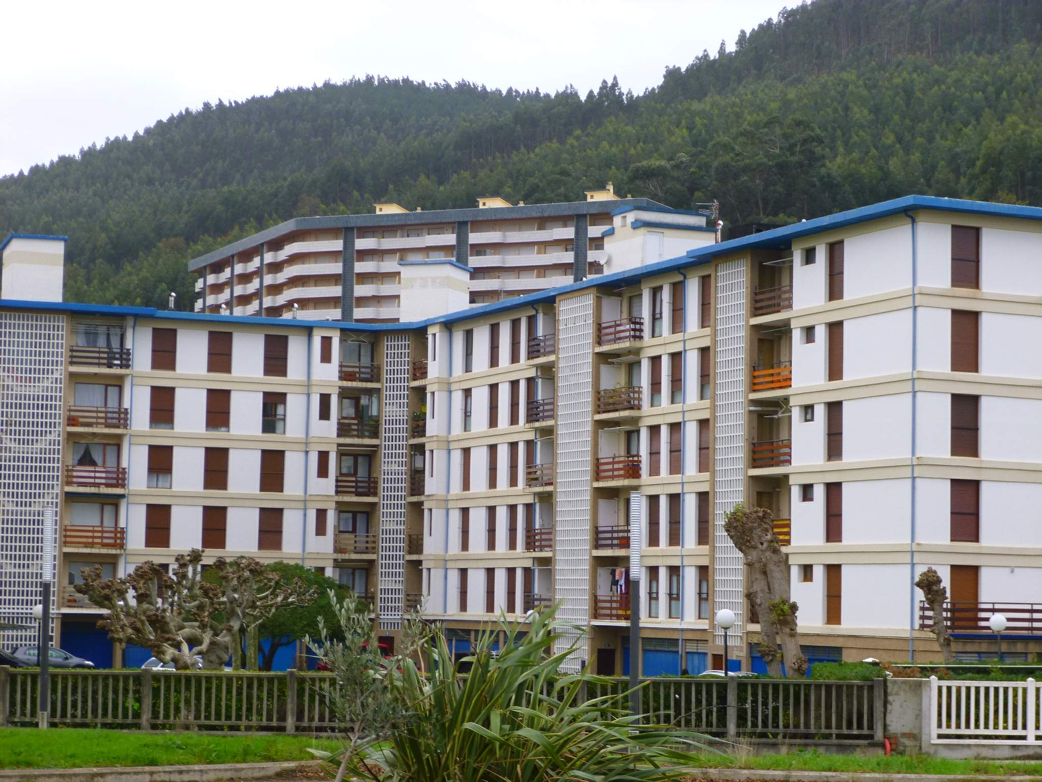 Bakio (Bizkaia)